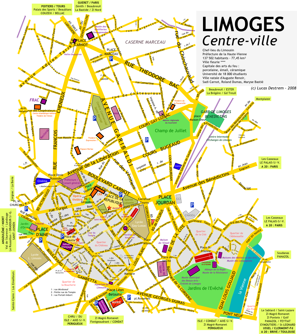 Plan du centre-ville de Limoges (Haute-Vienne, France)